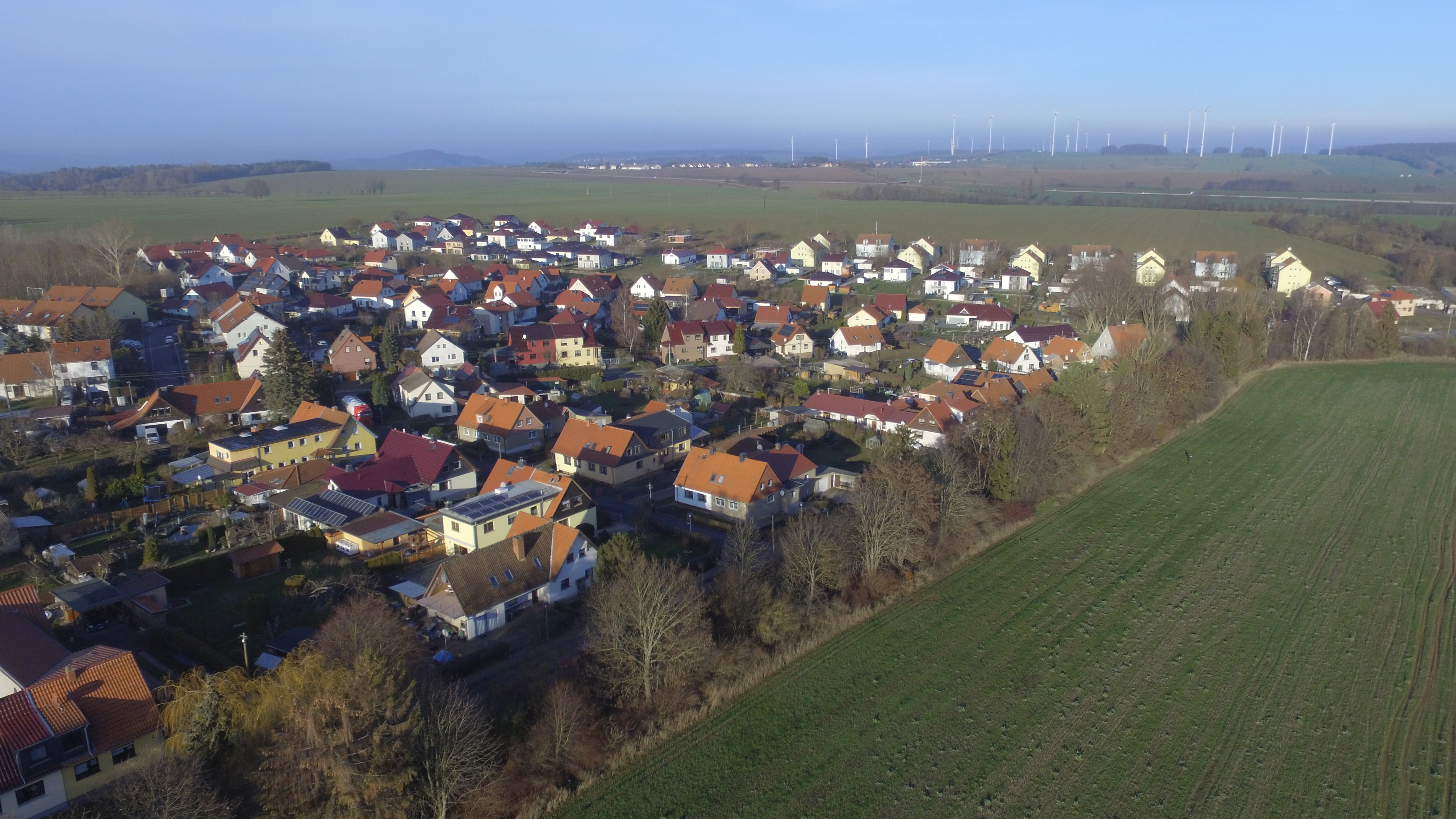 Hötzelsroda von oben Siedlung 1